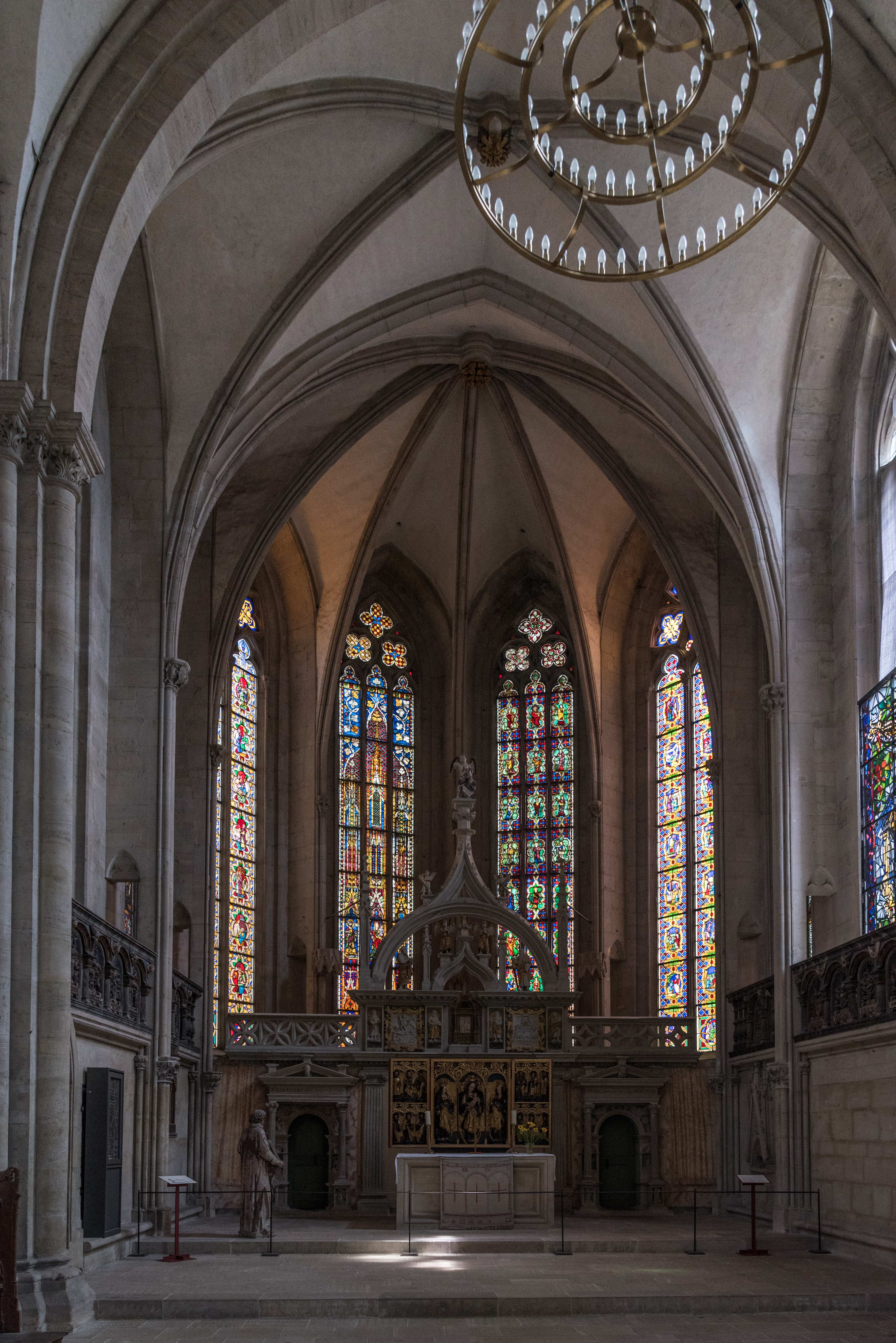 Naumburg an der Saale, Dom, Ostchor